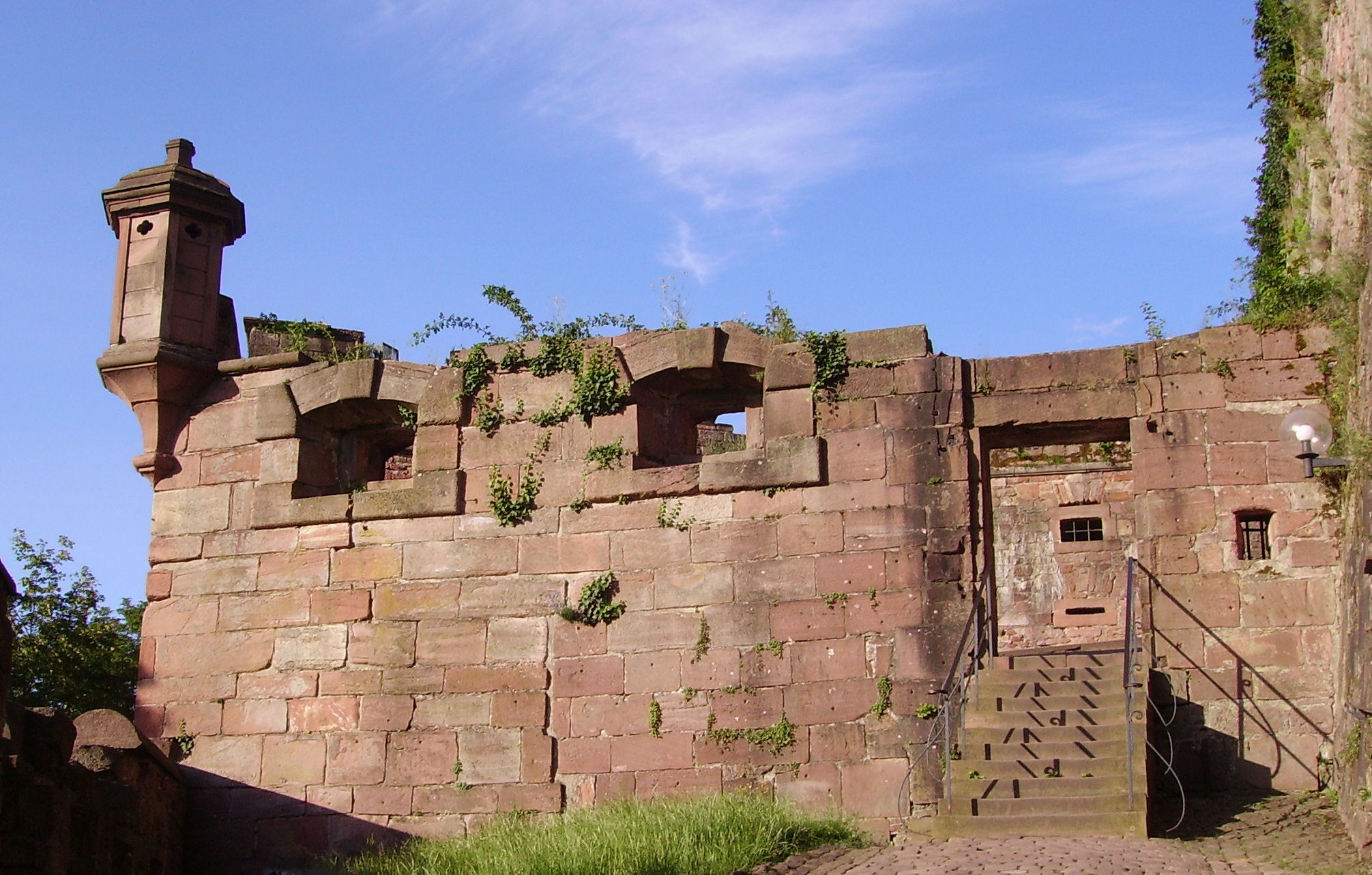 view of Heidelberg Castle